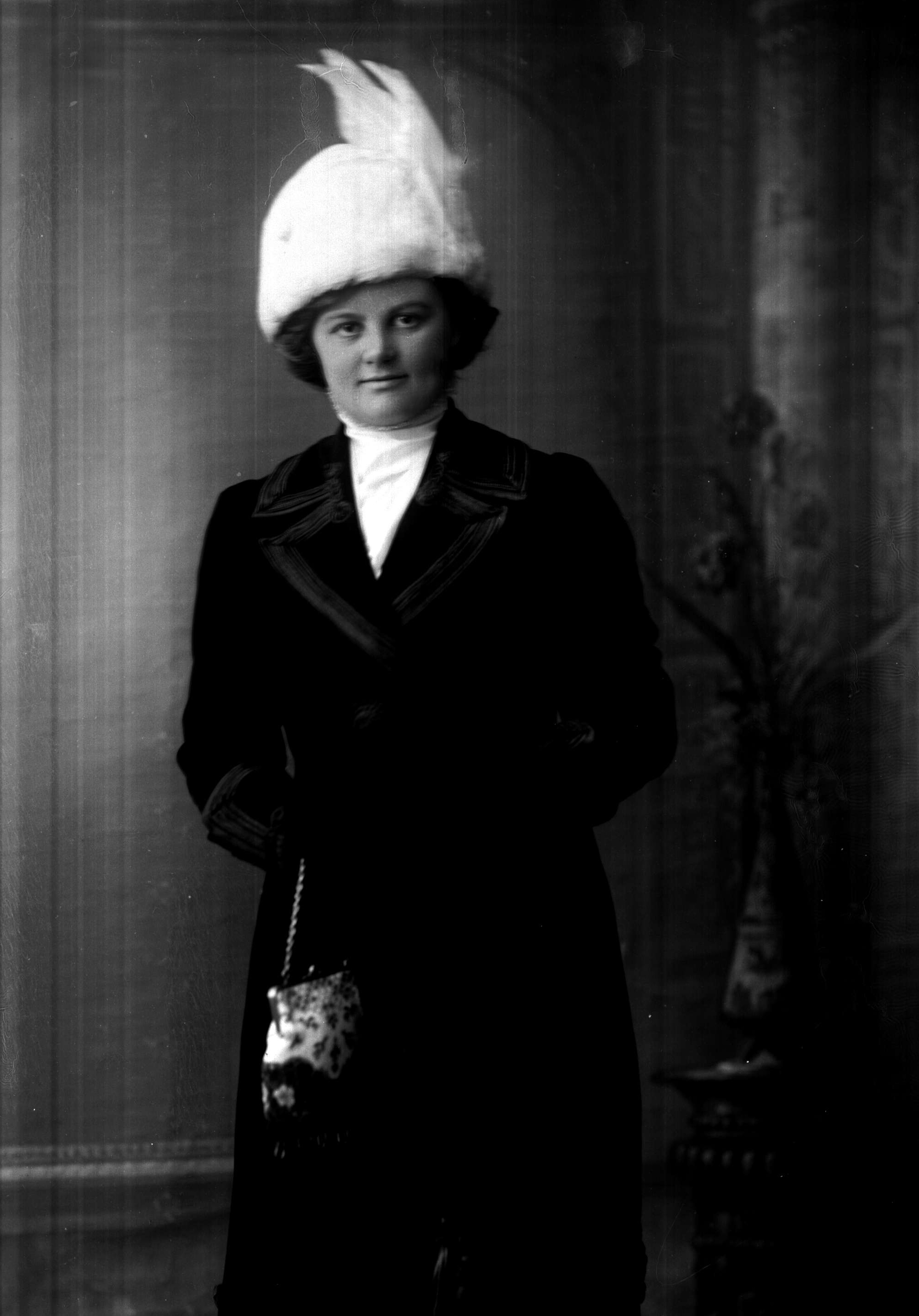 Erna Schøyen (wikidata:Q17120245)